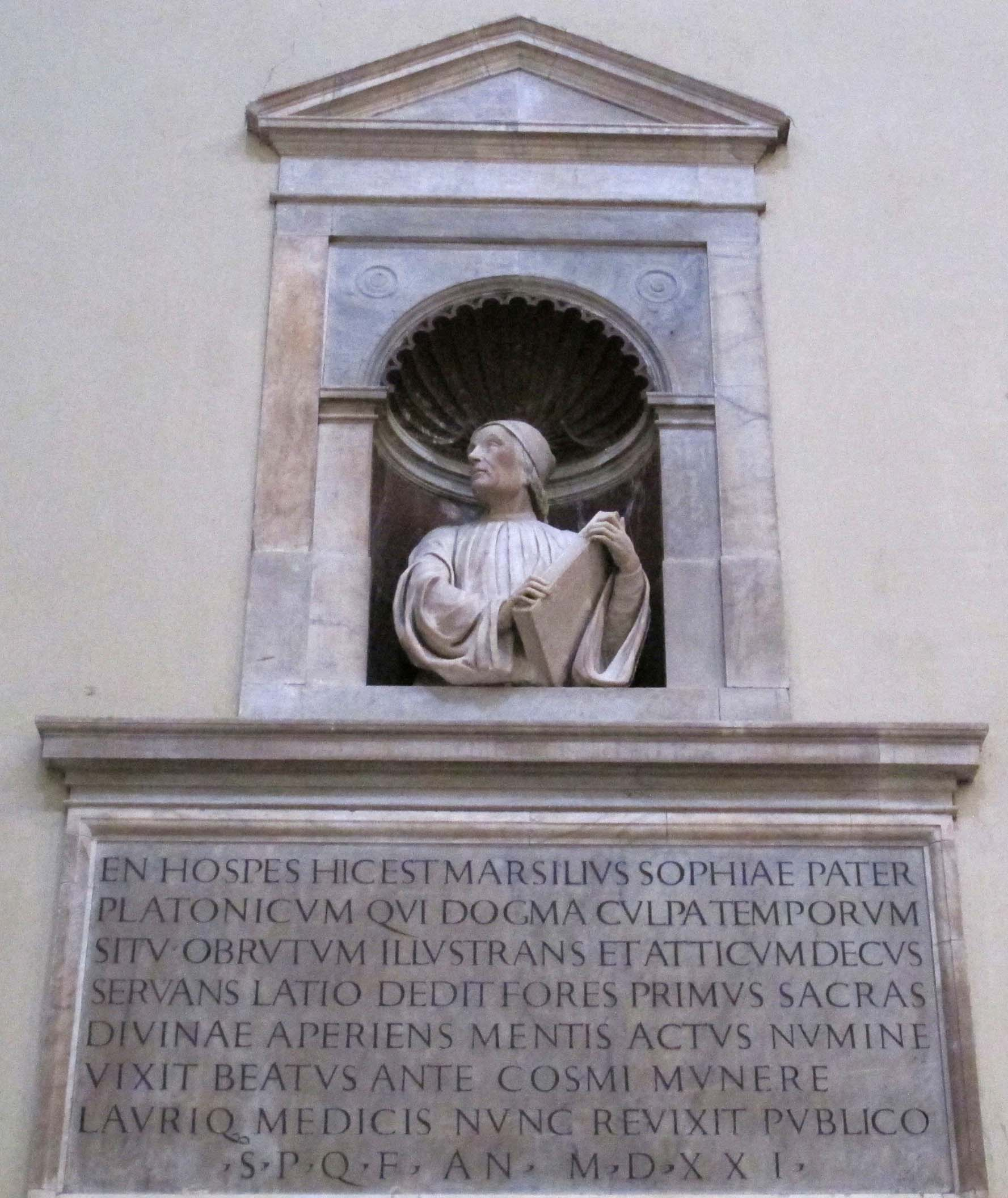 Duomo di firenze, Busto di Marsilio Ficino (XIX secolo)